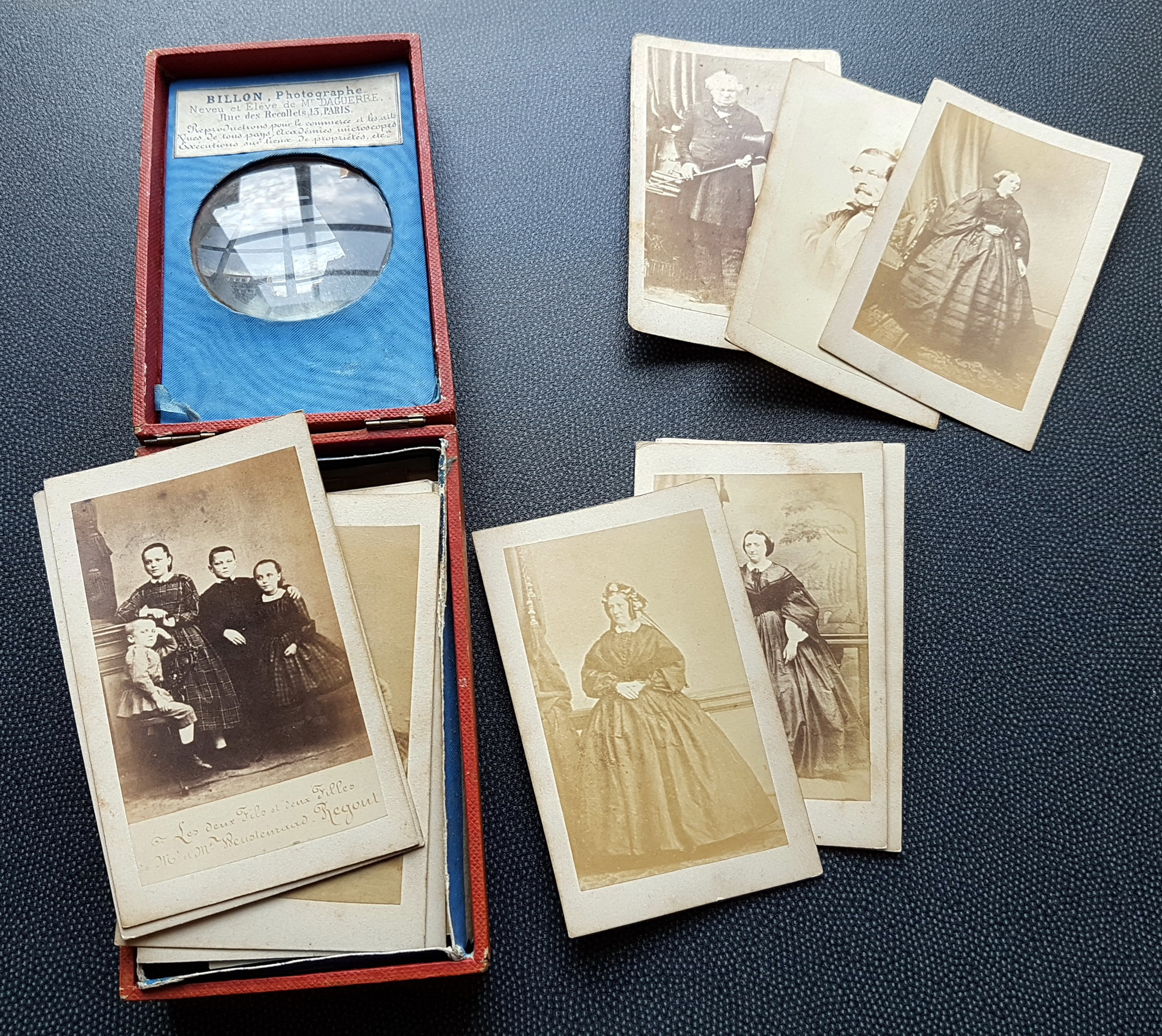 Doosje met foto's in het familiearchief van de familie Regout in het Regionaal Historisch Centrum Limburg in Maastricht. De foto's dateren van ca. 1869 en zijn gemaakt door "Billon, Photographe, Neveu et Élève de Mr. Daguerre, rue des Recollets 13, Paris".